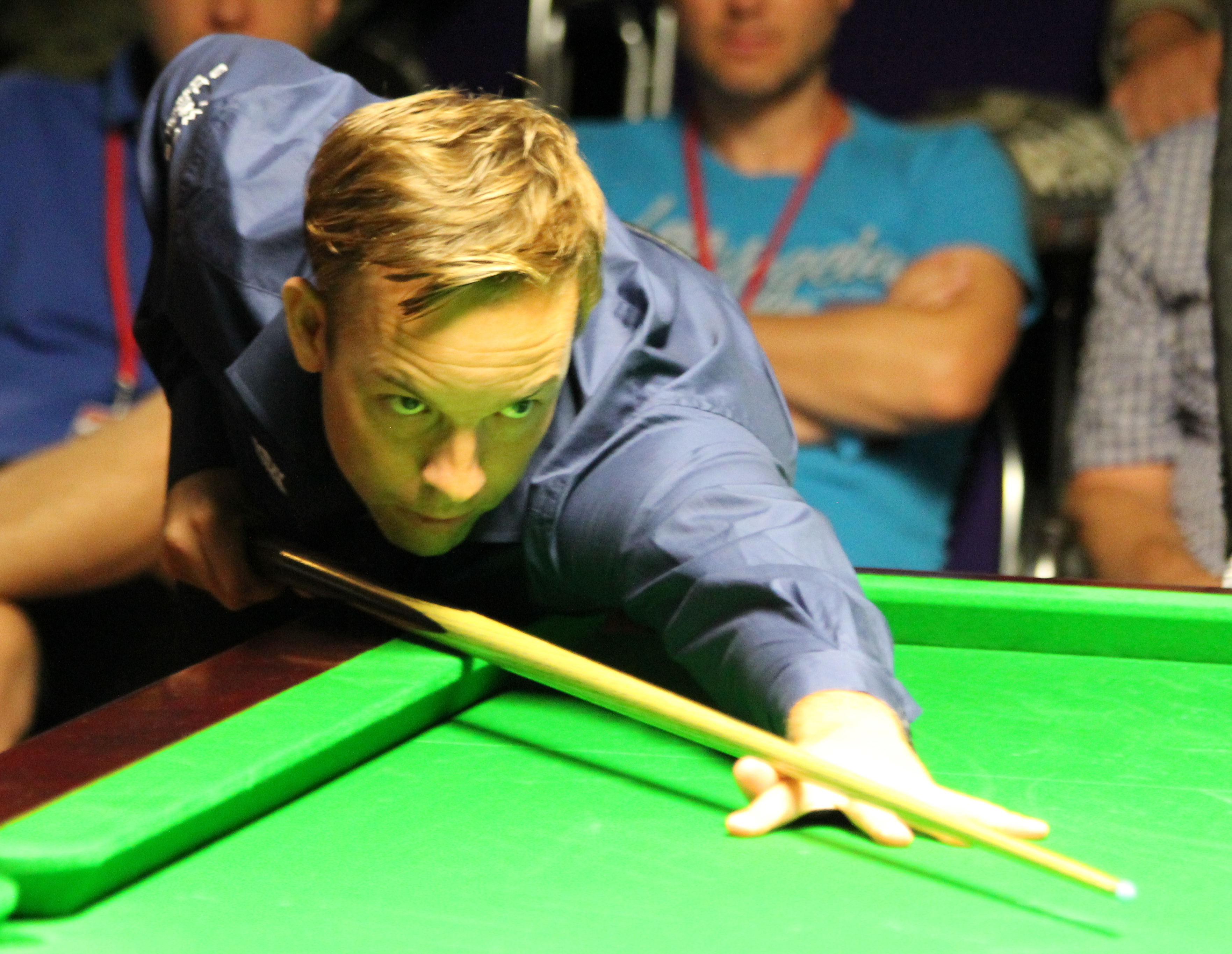 Ali Carter beim Paul Hunter Classic 2015